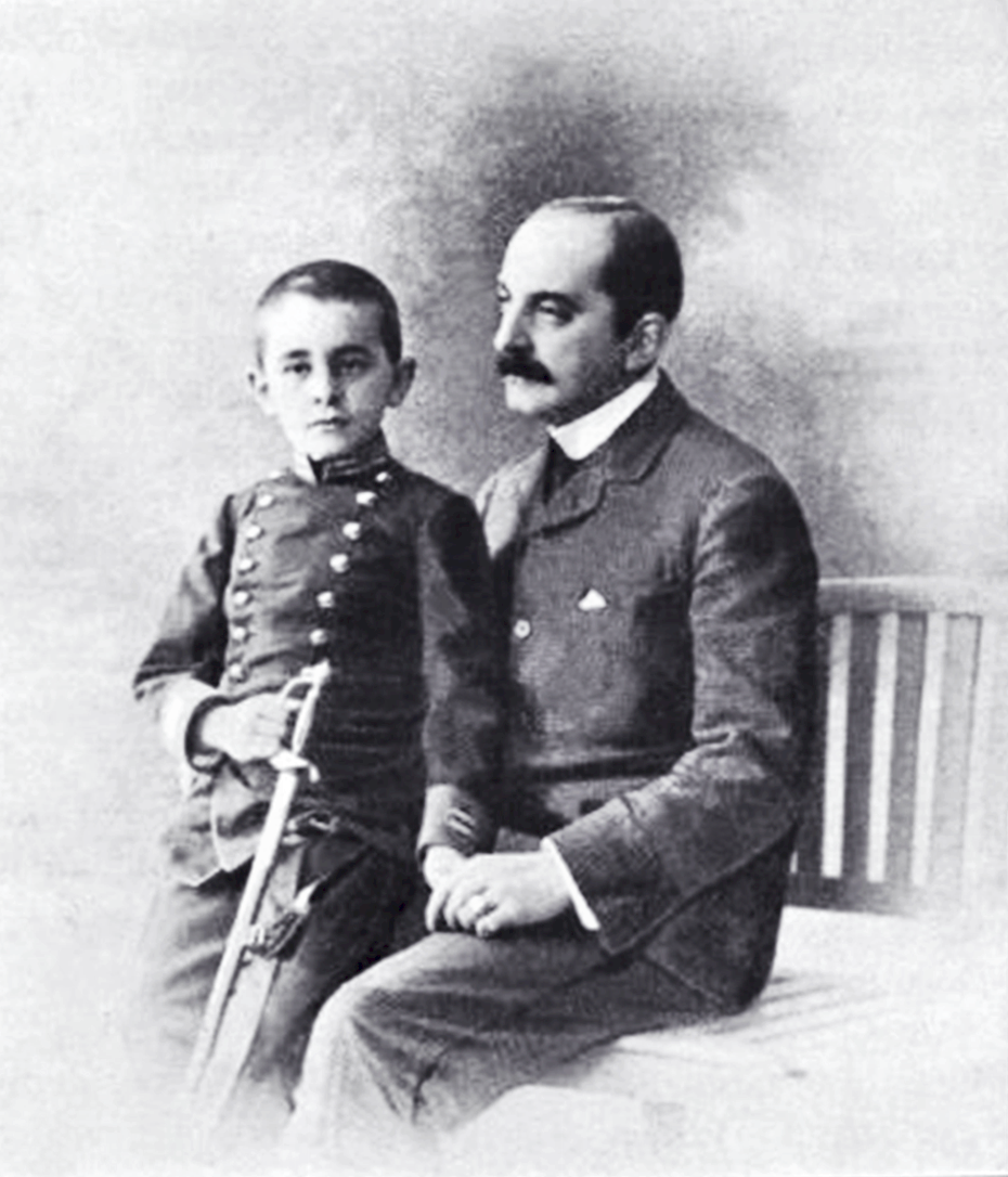 Nikolaus Ritter von Wassilko mit Sohn Hamilkar, 1903